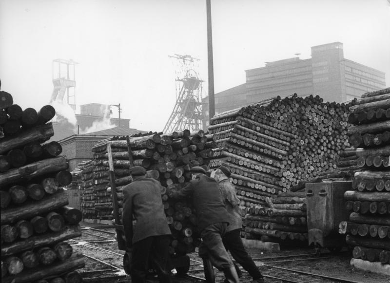 Ruhrgebiet-Essen Transport von Grubenholz auf dem Holzplatz. Im Hintergrund von links: Schächte Amalie und Marie und Kohlenwäscher